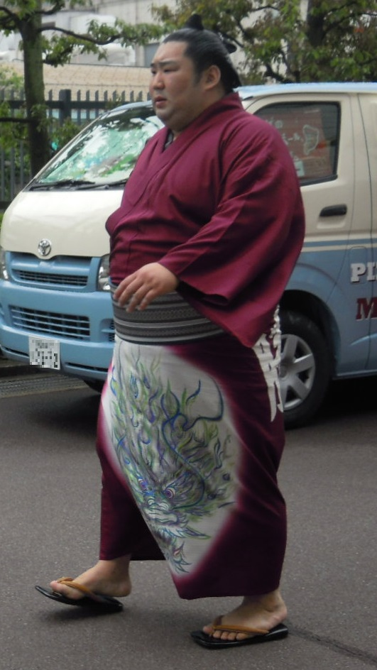 平成26年五月場所3日目、国技館入りする德勝龍関